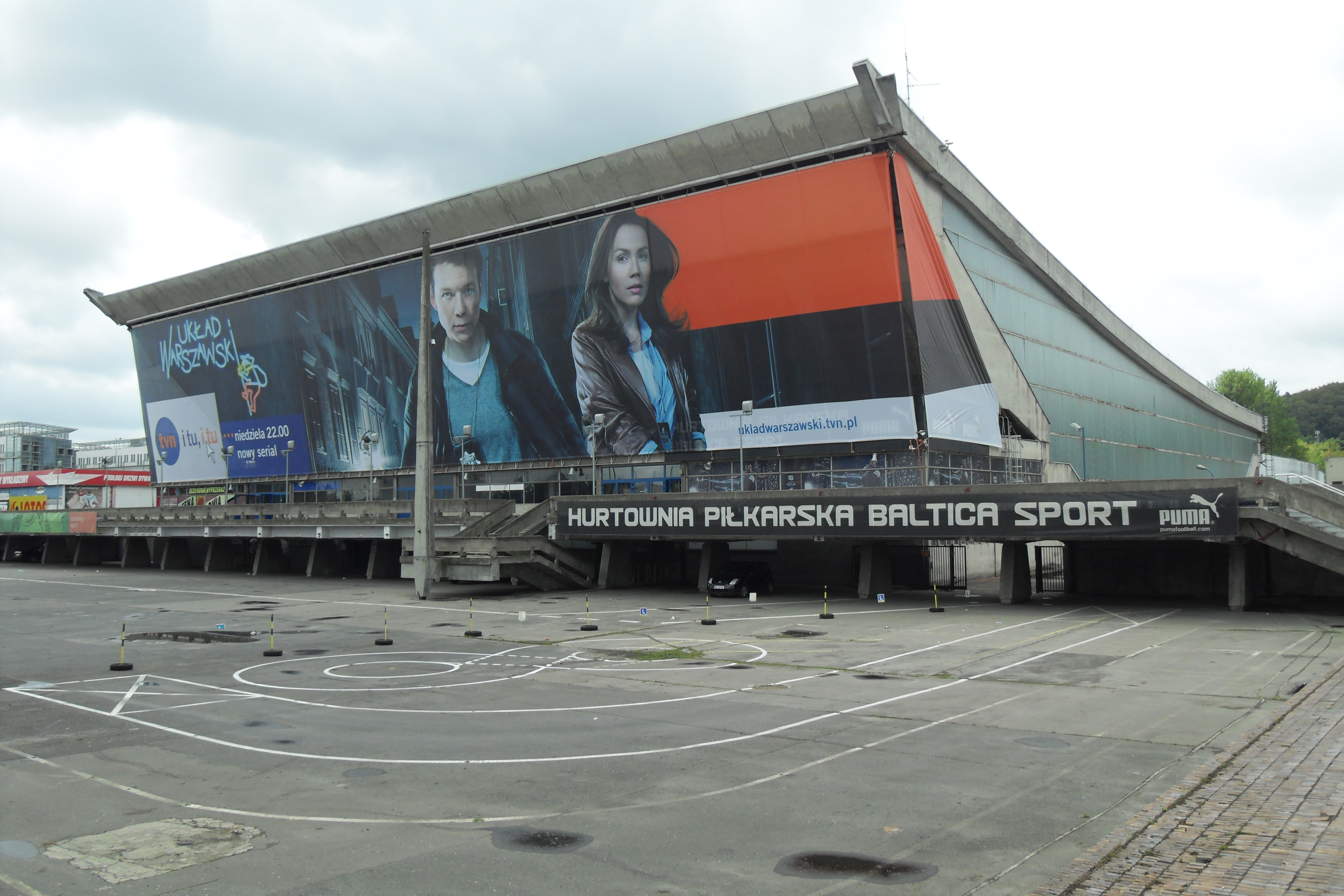 Gdańsk Oliwa, Hala Olivia. Billboard reklamujący serial telewizyjny "Układ warszawski".